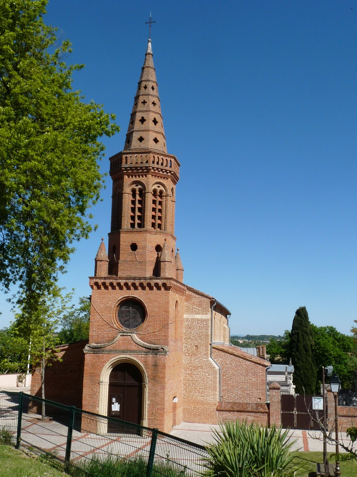 Eglise de Mons, Haute-Garonne, France